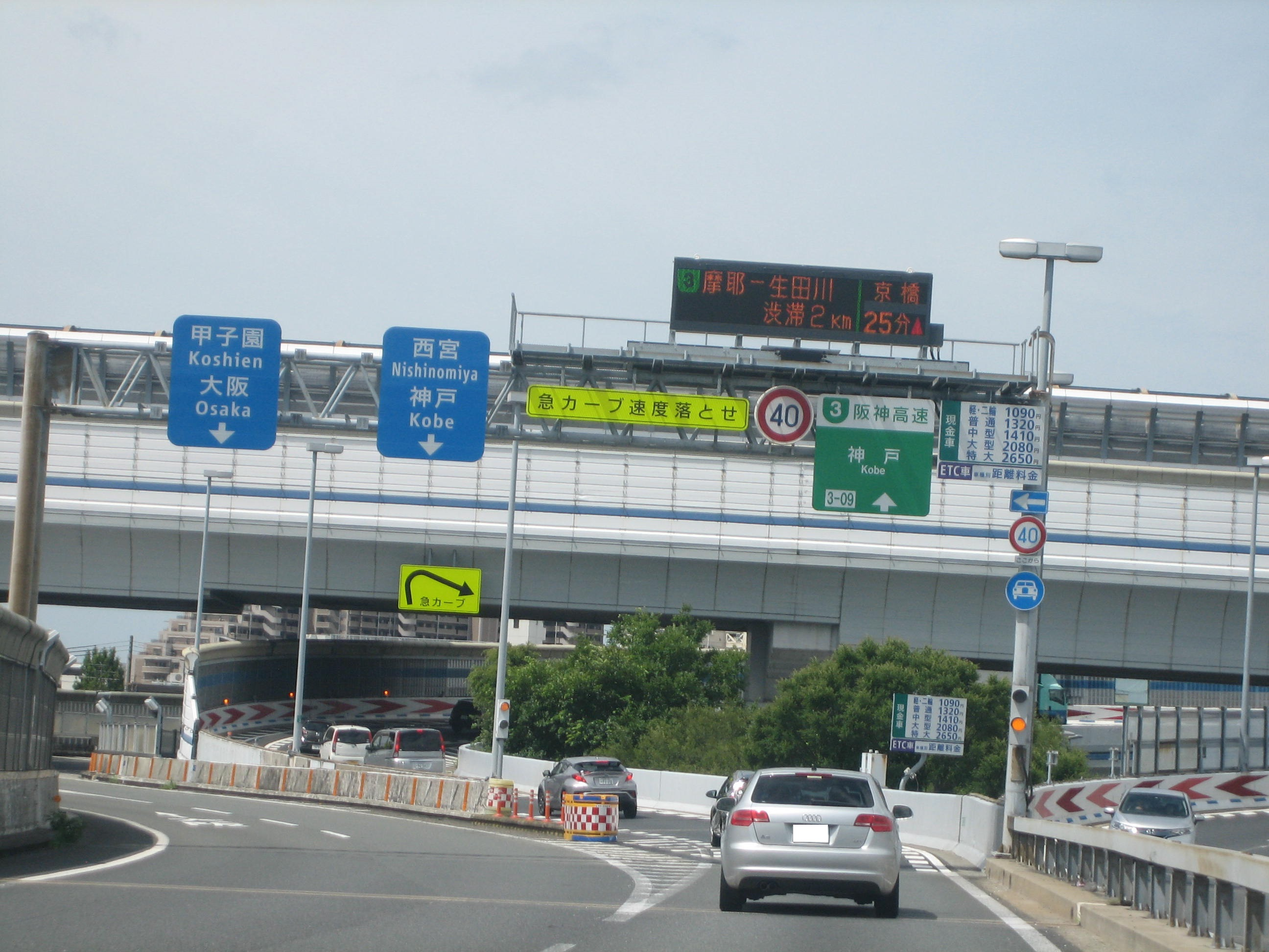 阪神高速3号神戸線、西宮IC入口